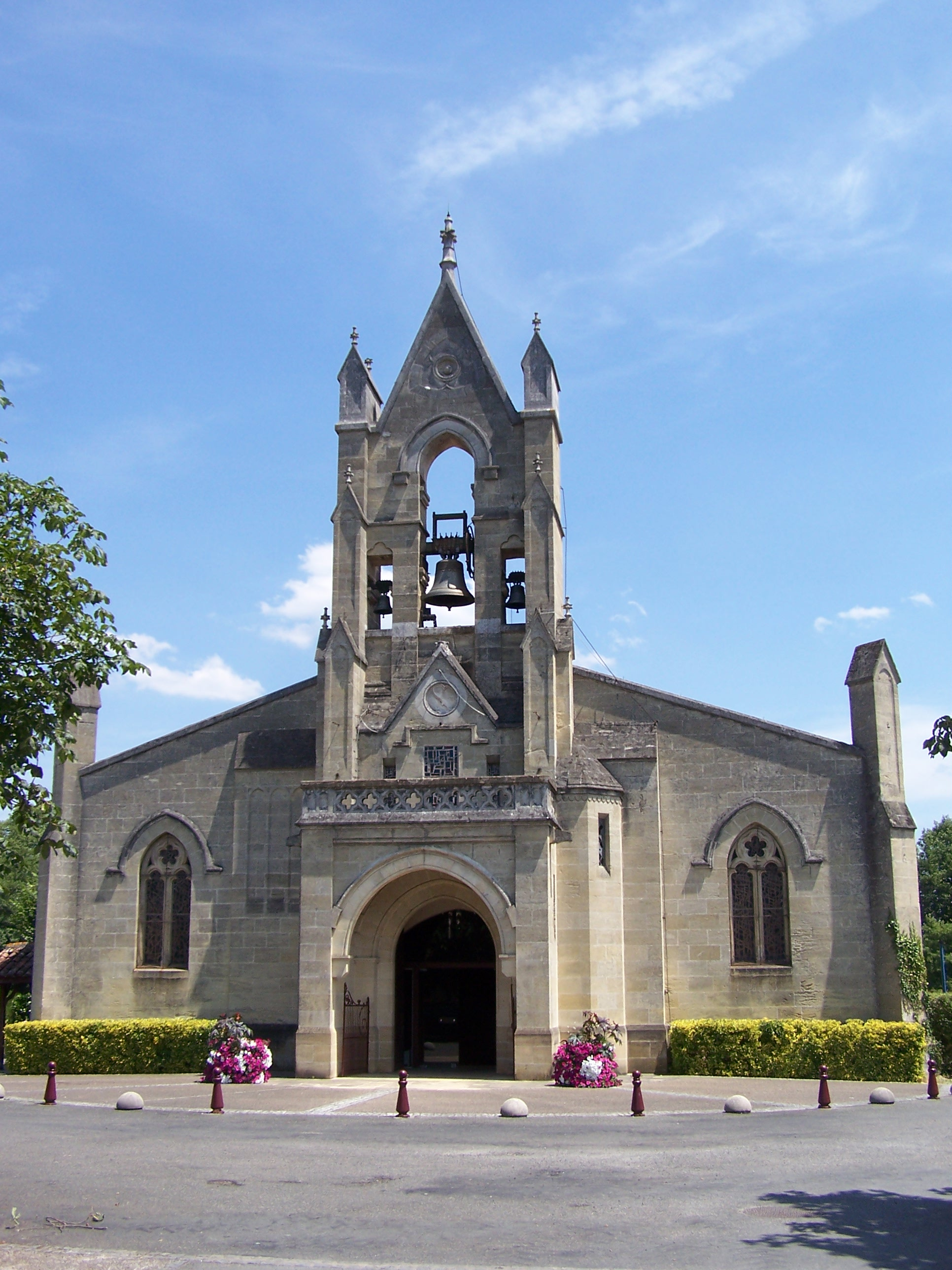 Église de Saint-Symphorien, Gironde, France